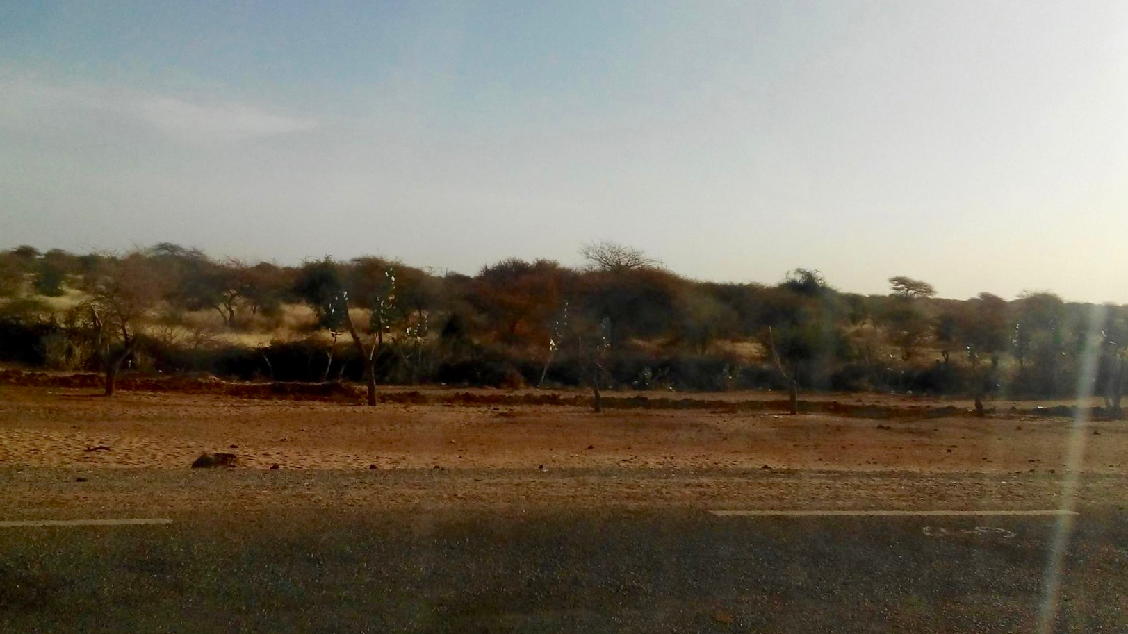 Nationalstraße 25 östlich des Dorfs Abala, Gemeinde Abala, Niger.